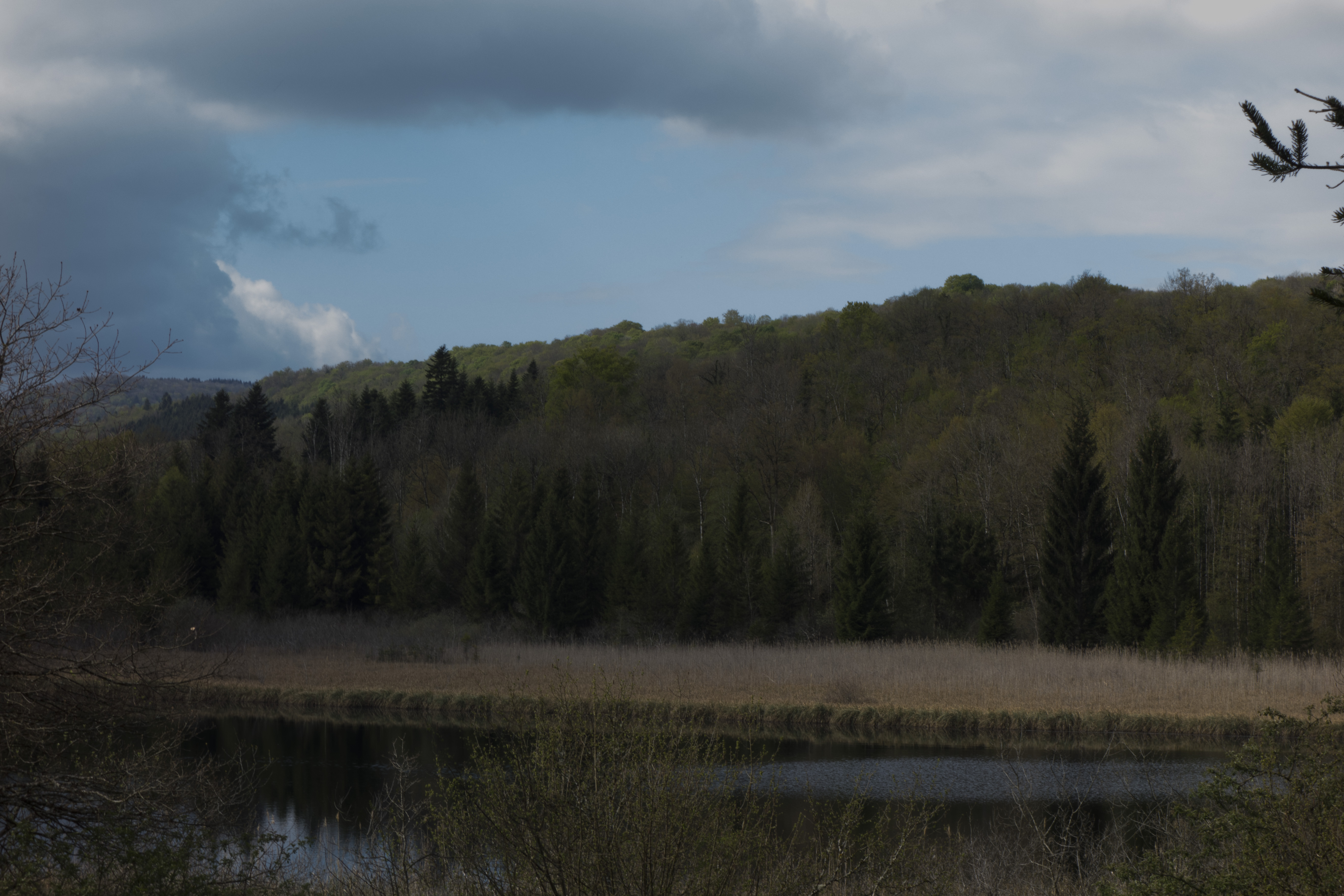 Lac d'Onoz, 2016, Jura, près du lac de Vouglans. Lac circulaire, d'origine glaciaire.